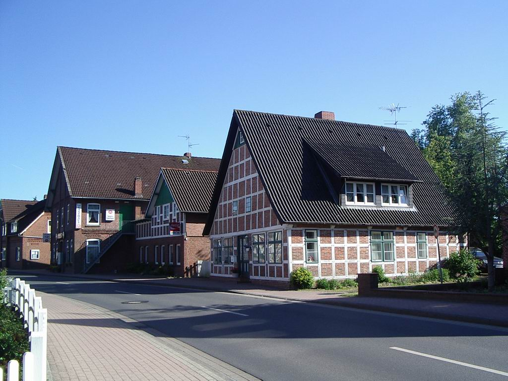 Neuenkirchen, Land Hadeln, Dorfstraße, Blick auf denkmalgeschütztes Fachwerkgebäude Nr. 38 Foto von Benutzer:Geoz 2005